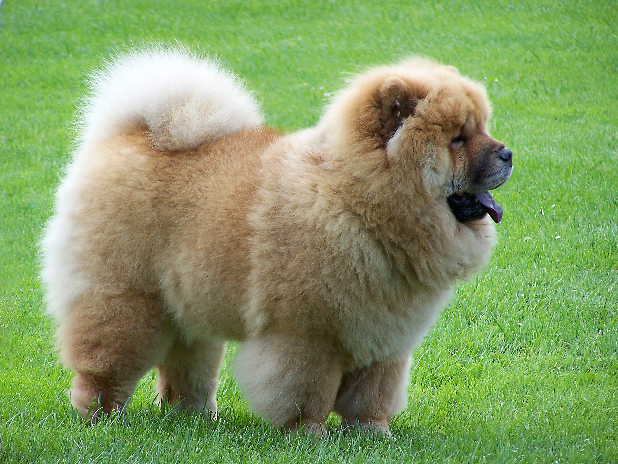 Chow Chow, Międzynarodowa Wystawa Psów Rasowych, Szczecin 2007